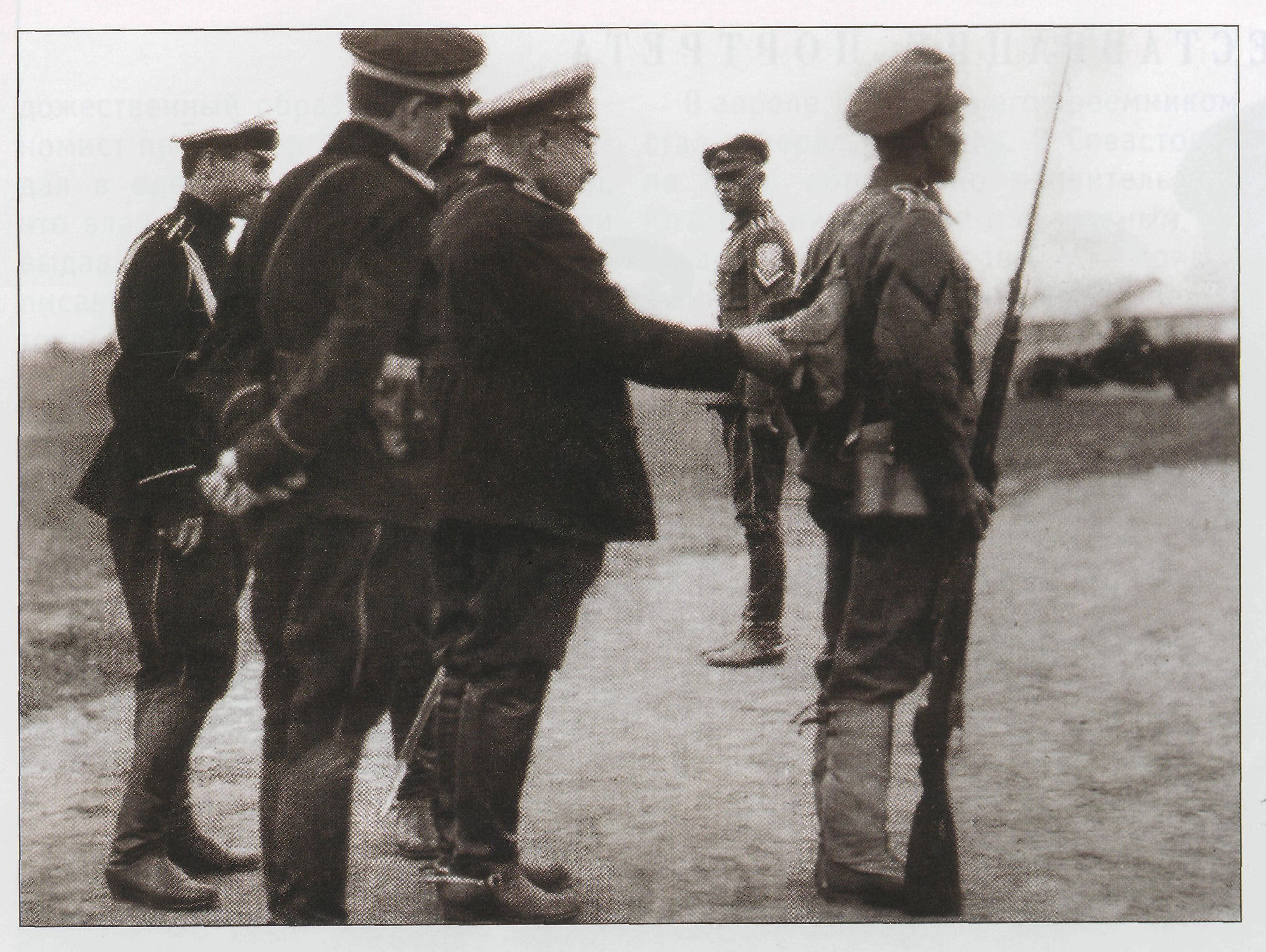 Смотр 2-го Корниловского ударного полка, Ростов. Командующий белой Добровольческой армией генерал Владимир Зенонович Май-Маевский с шашкой и со шпорами осматривает снаряжение ударника Корниловского полка. Второй слева, вполоборота - адъютант Его Превосходительства красный разведчик капитан Павел Васильевич Макаров (в дроздовской форме, фуражка с чёрным верхом и светлым околышем). Сзади справа легковой автомобиль командующего. Ростов-на-Дону, июль 1919 года. См. также :ru::Обсуждение:Макаров, Павел Васильевич#Изображения Павла. Какой из двоих Макаров-то?